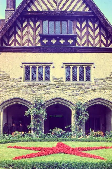 Цецилиенхоф